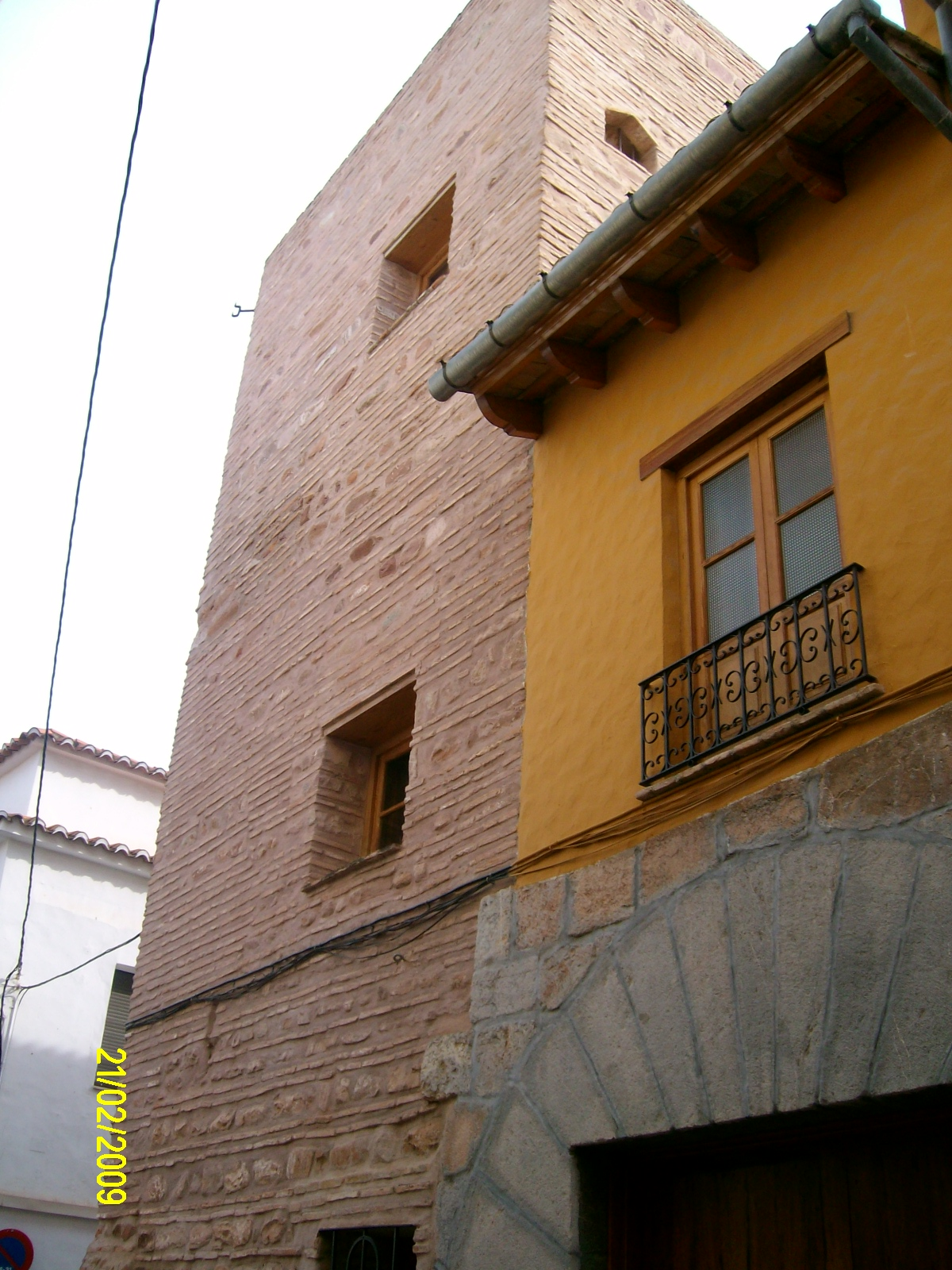 Torre Musulmana a Puçol